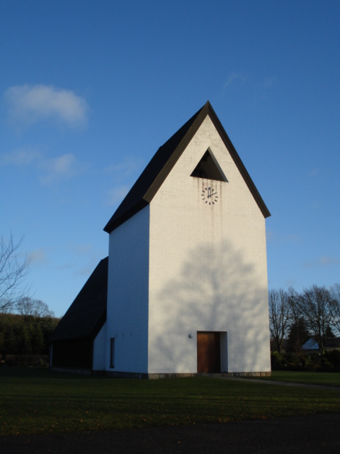 Pindstrup Church, Jutland, Denmark